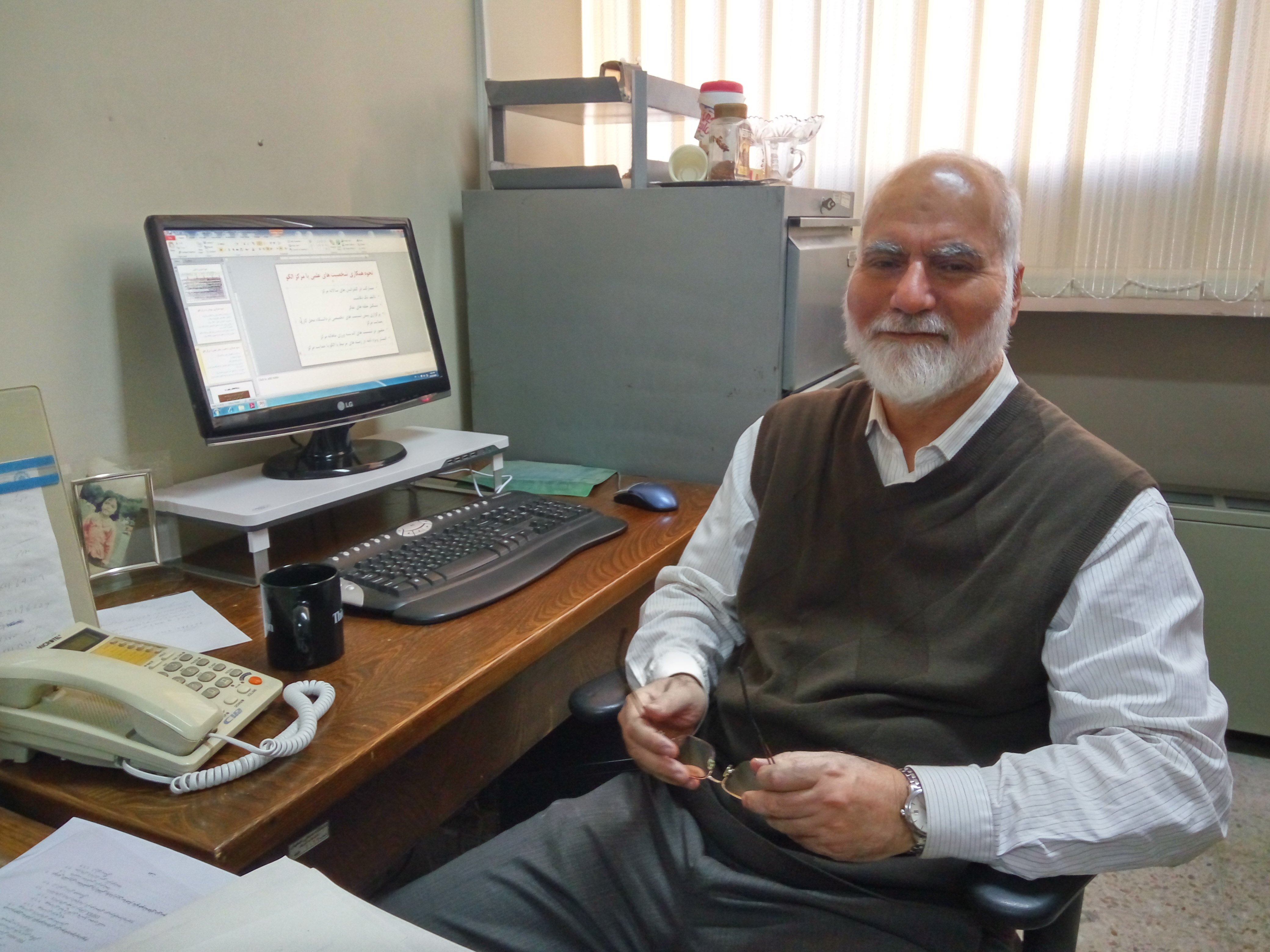 دکتر اکبرزاده، آذرماه ۱۳۹۵، دانشکده فیزیک دانشگاه صنعتی اصفهان